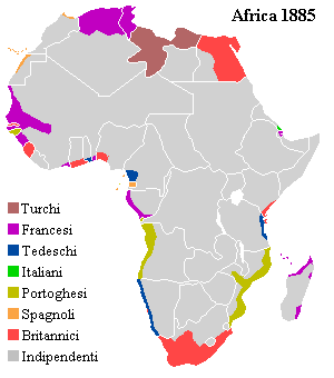 L'Africa alla vigilia della grande spartizione coloniale